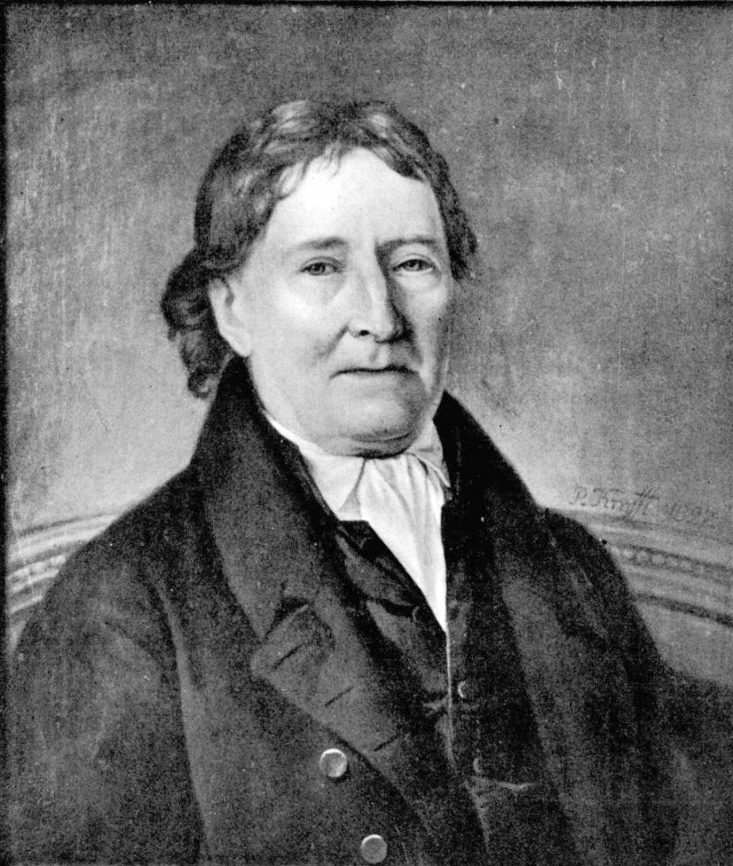 Jonas Kjellberg (1752–1832). Svart väst, mörkblå rock med förgyllda knappar, förgylld, rödklädd soffa, blågrå fond.